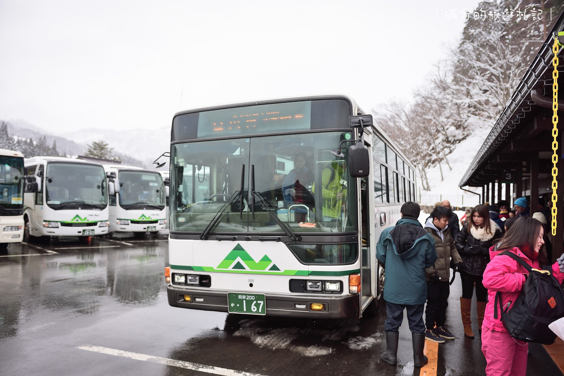 【日本交通】中部機場到白川鄉交通方式